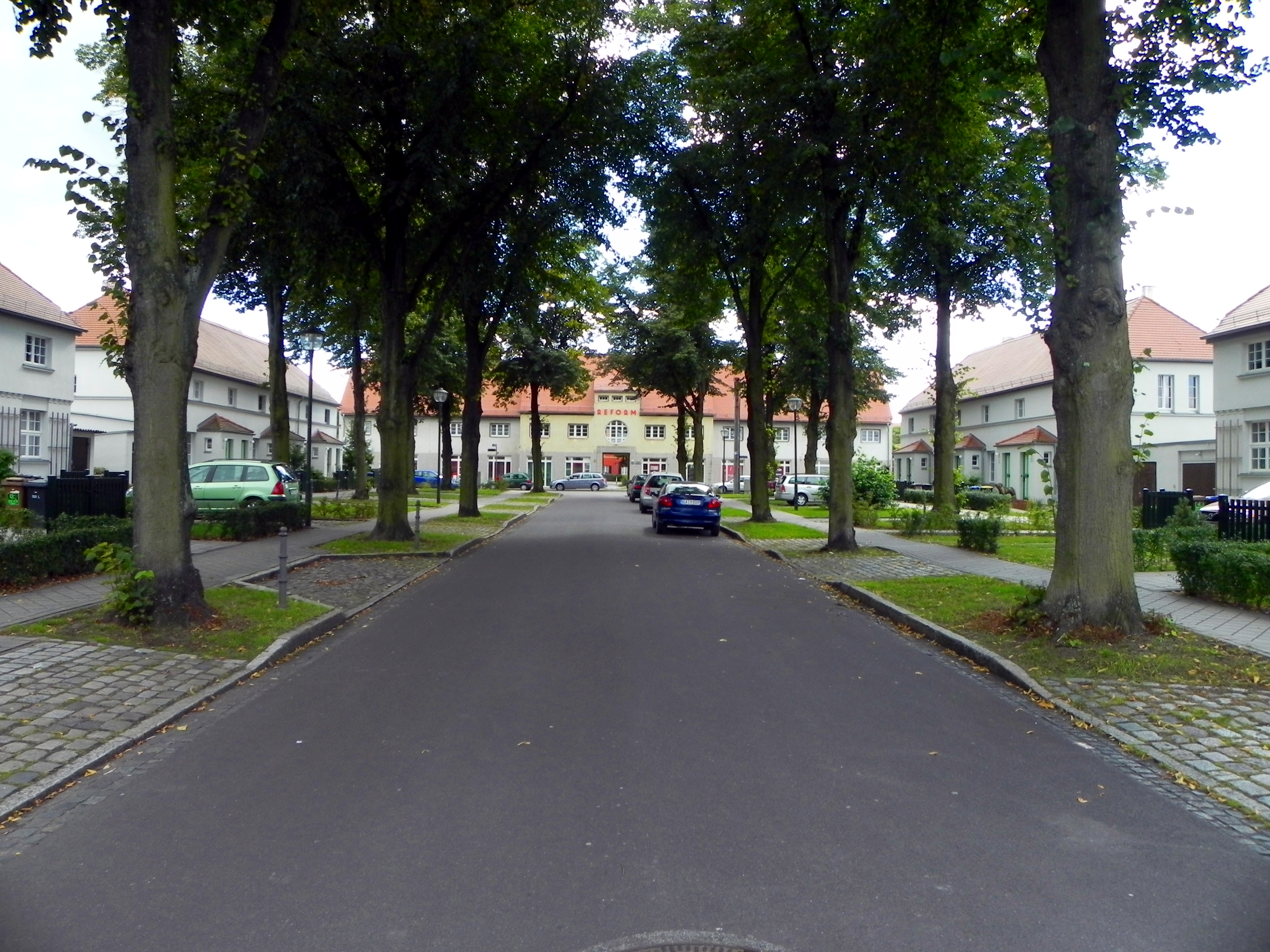 Magdeburg Reform